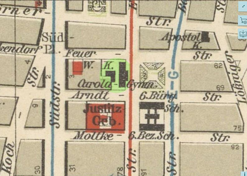 Lage des Königin-Carola-Gymnasiums Leipzig auf einem Plan von 1914.